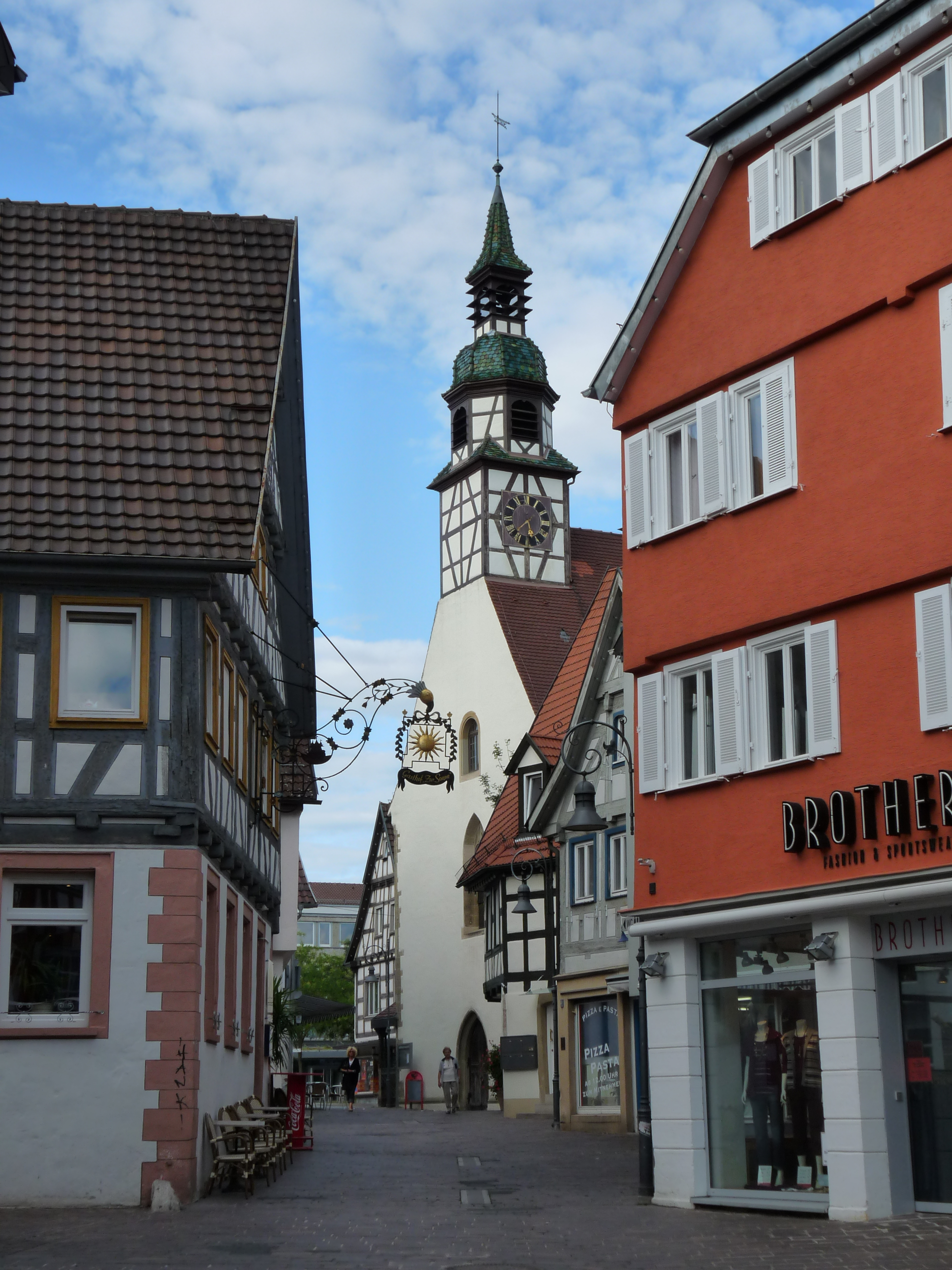 Waiblingen - Nikolaus-Kirche